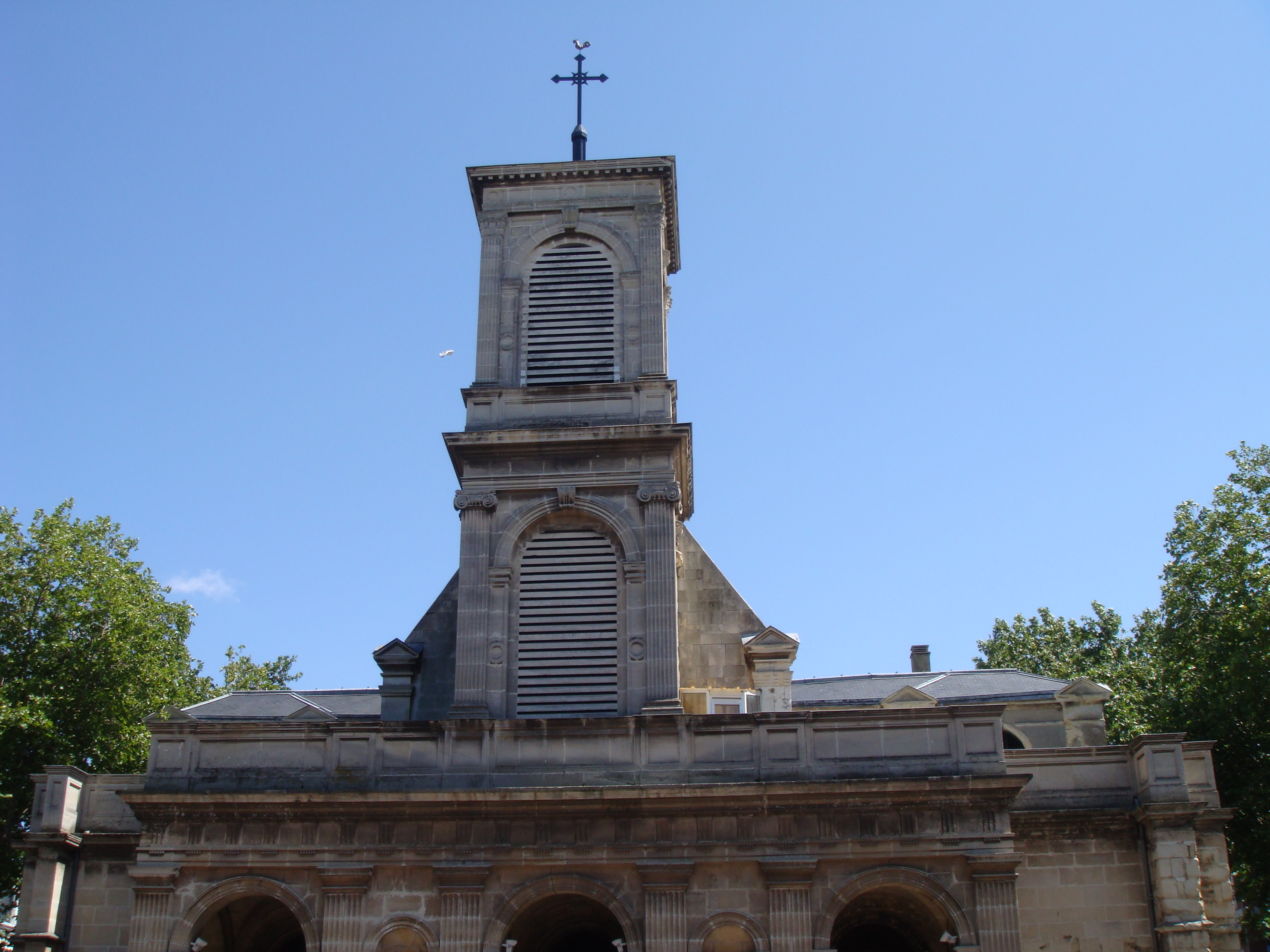 Tour classique avec la partie supérieur des arcades du porche construits en 1841.